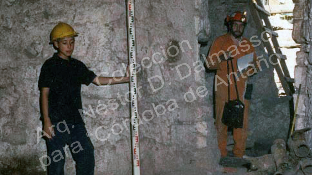 Livio Incatasciato 12 Cripta-2P